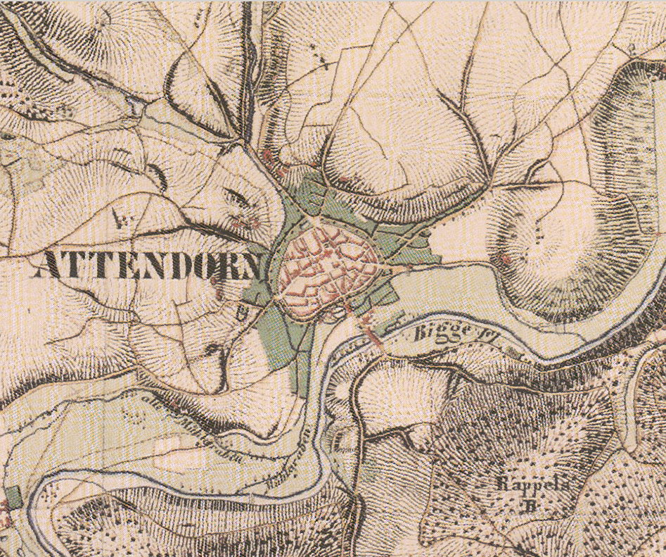 Ausschnitt Attendorn, preußische Kartenaufnahme 1840, Historika25